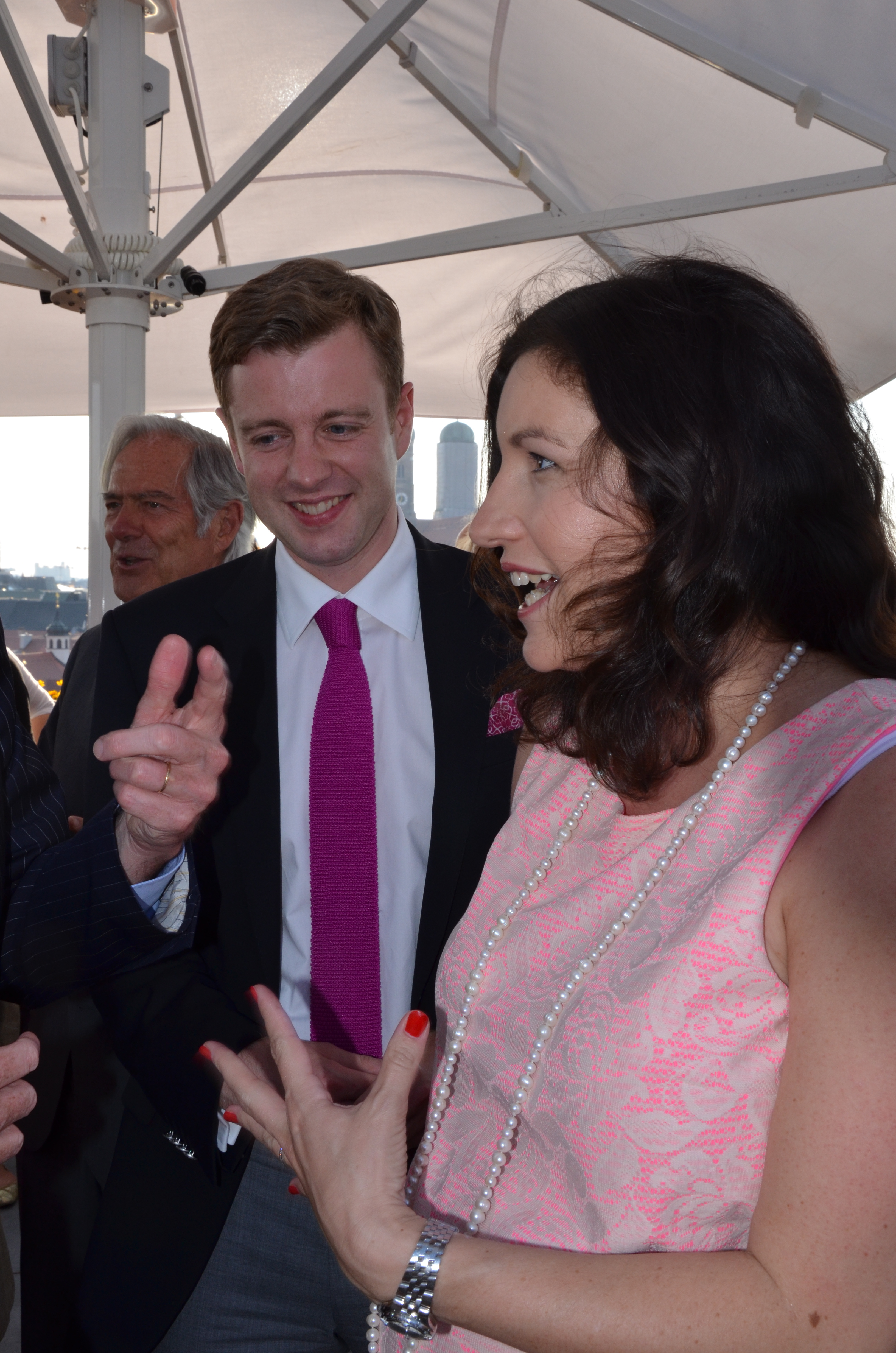 von links: Roland Berger, Oliver Bär und Dorothee Bär, Juli 2012